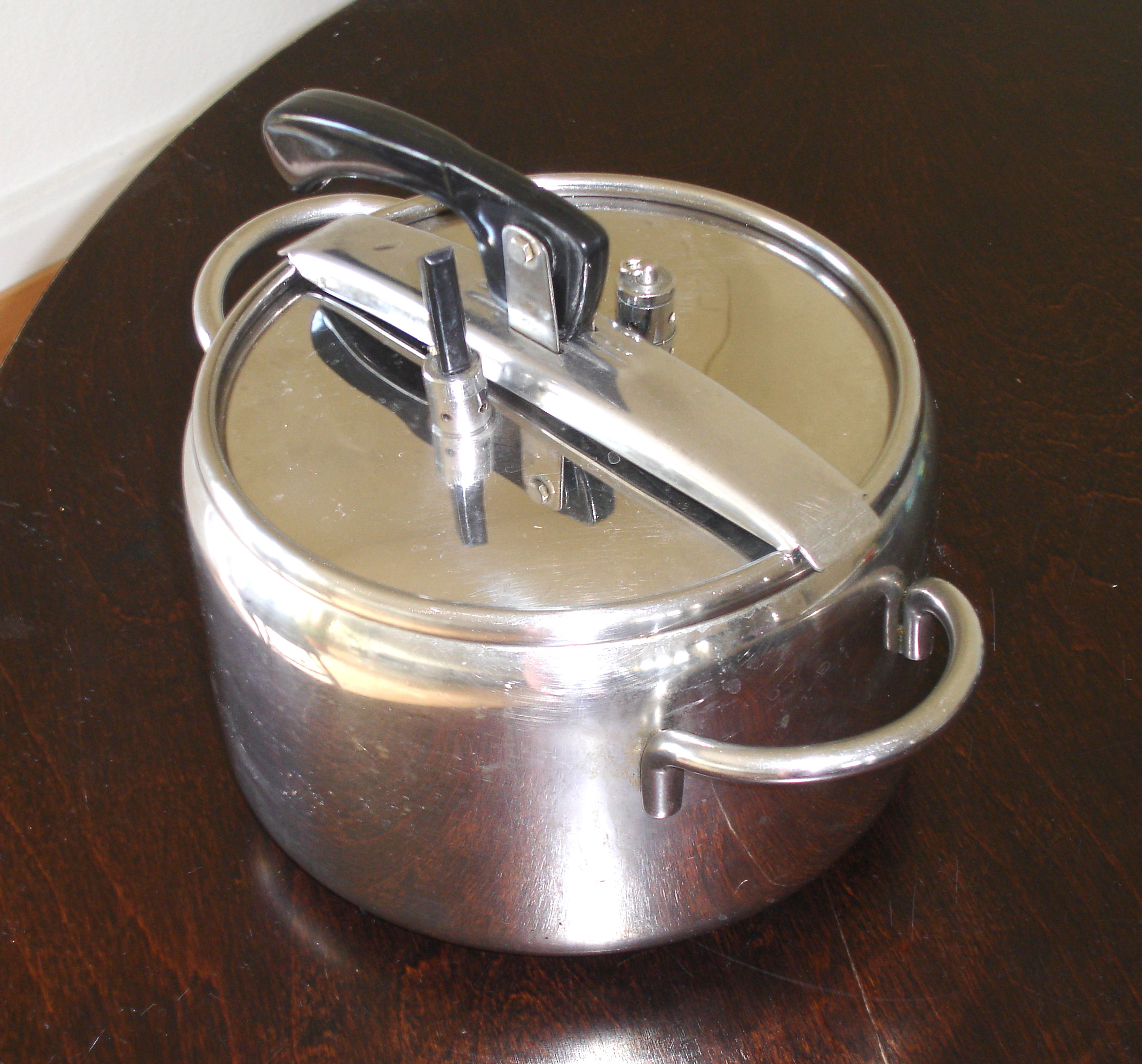 Pressure cooker, Italy. Pentola a pressione